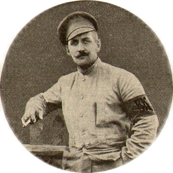 Vladimir Taburin